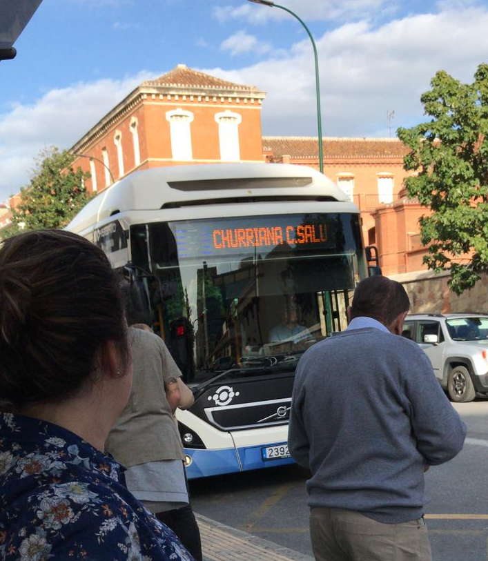 Vehículo de la línea 9 de la EMT de Málaga a su paso por la estación Málaga María Zambrano.